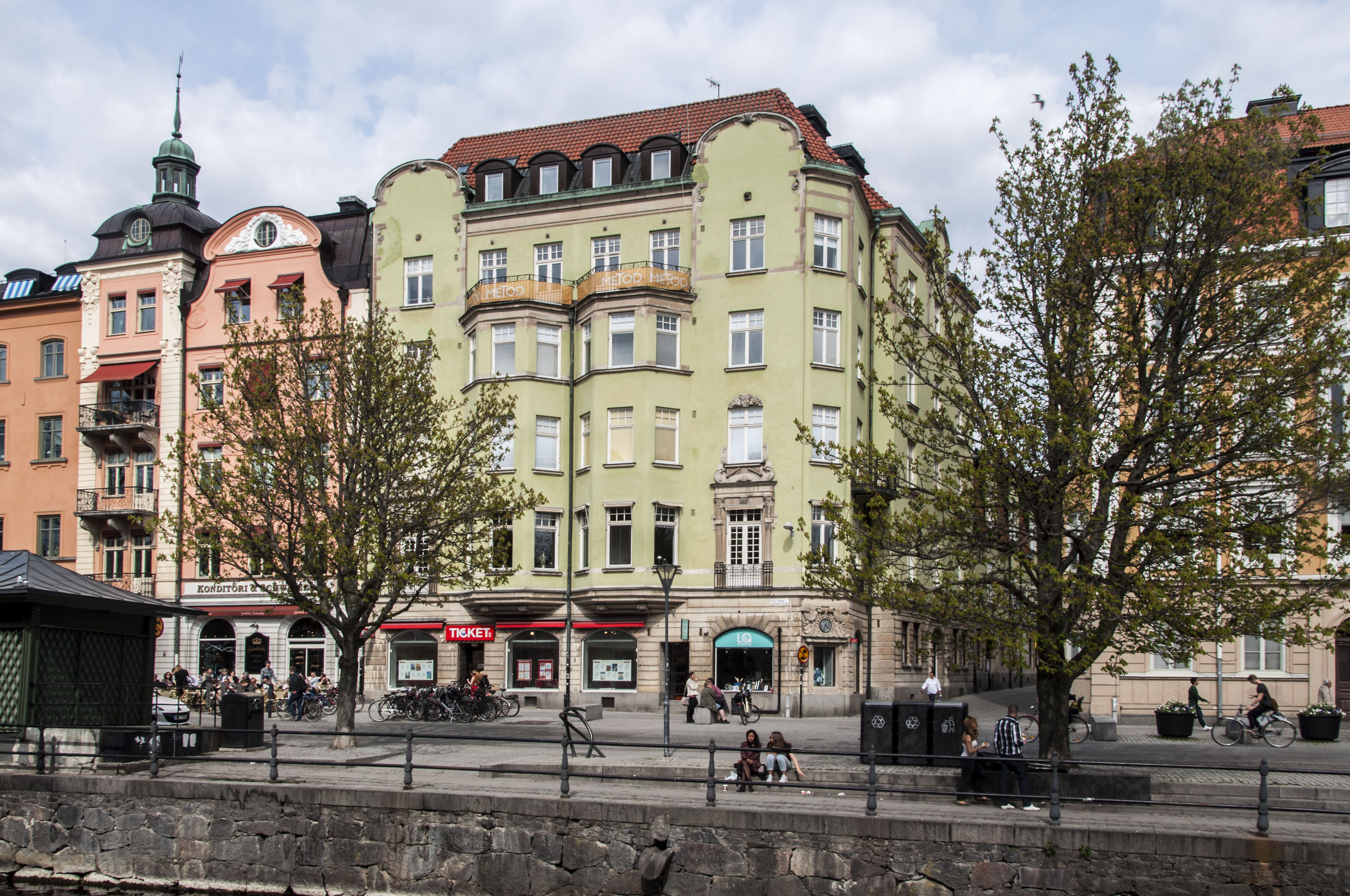 Tidningen Upsalas hus, Östra Ågatan 33 - Smedsgränd 2, Byggnadsår 1907. arkitekt Carl-Robert Lindström